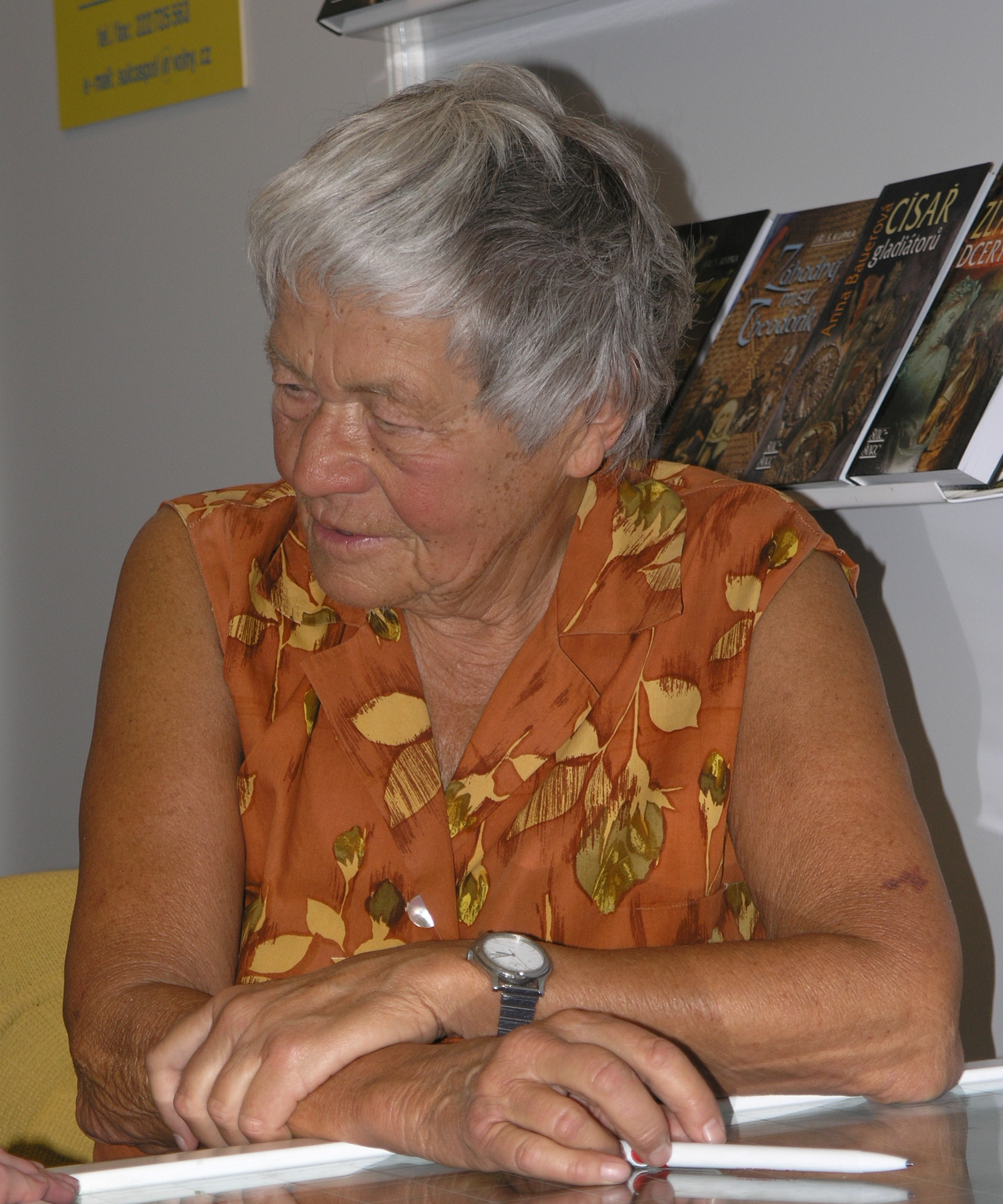 Praha, Svět knihy 2009 - Ludmila Vaňková